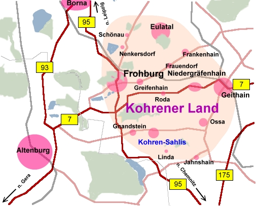 Schematische Karte Kohrener Land